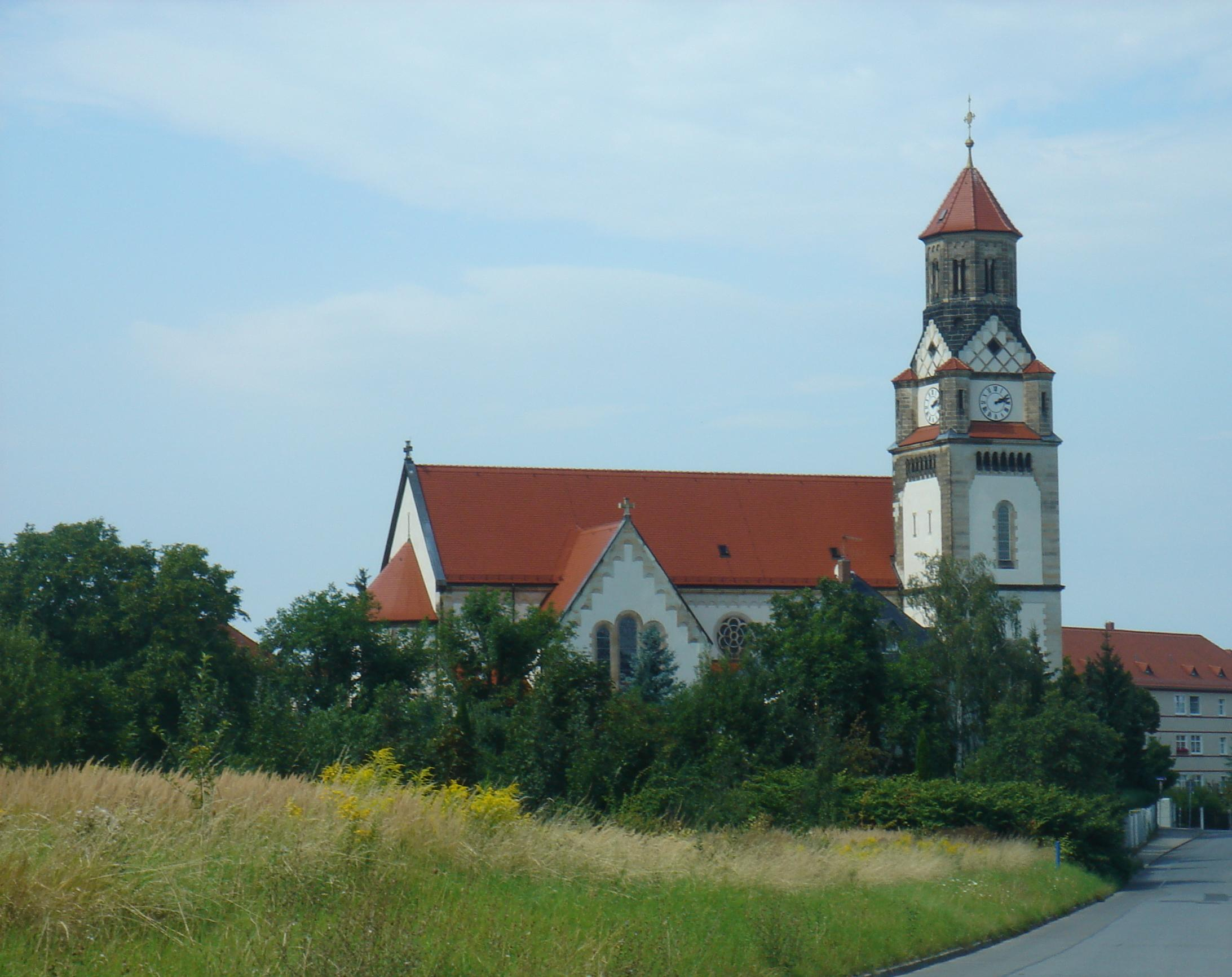 Blick aus Richtung Steinbacher Straße auf die Marienkirche Dresden-Cotta